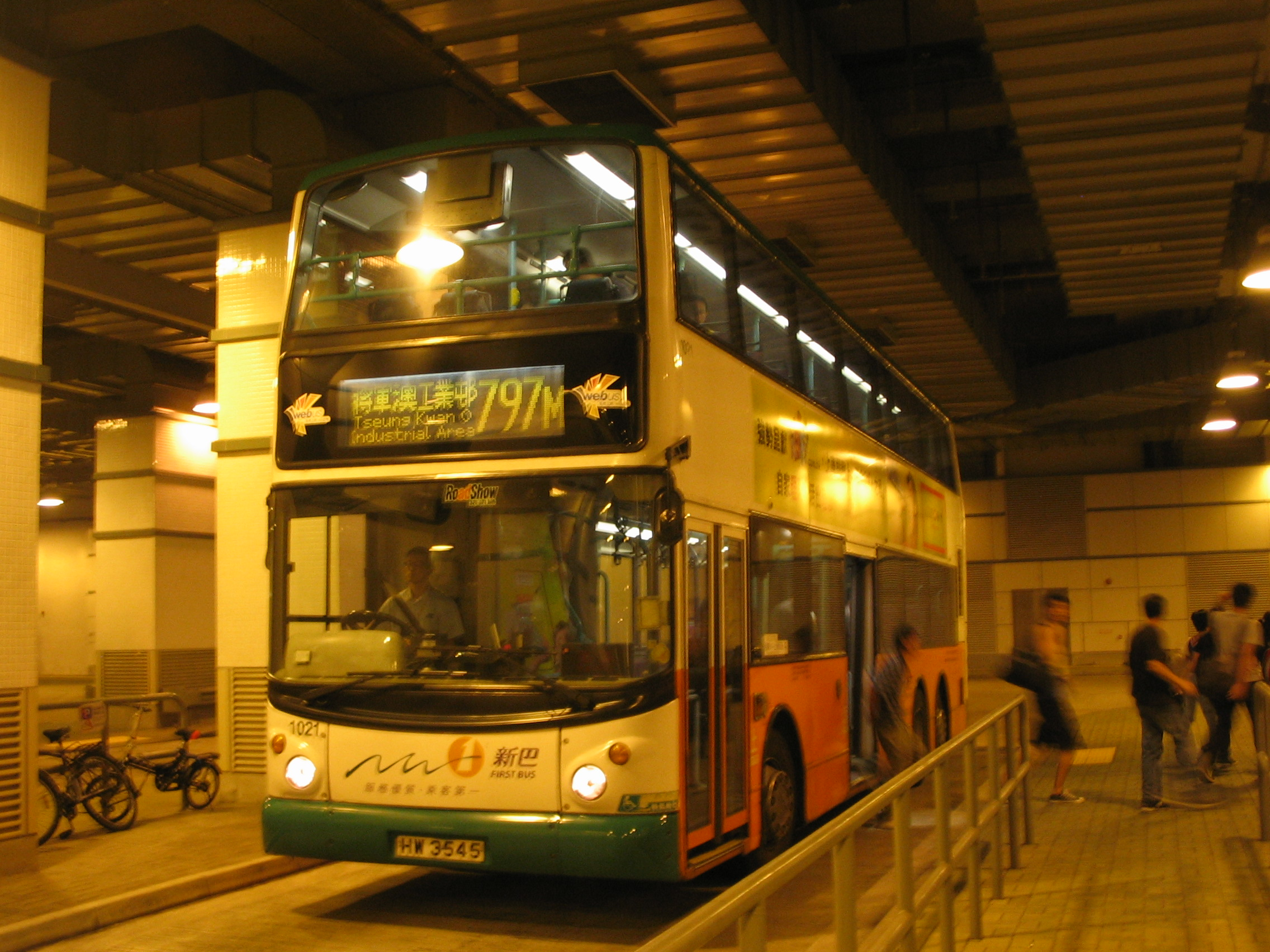 1021@797M